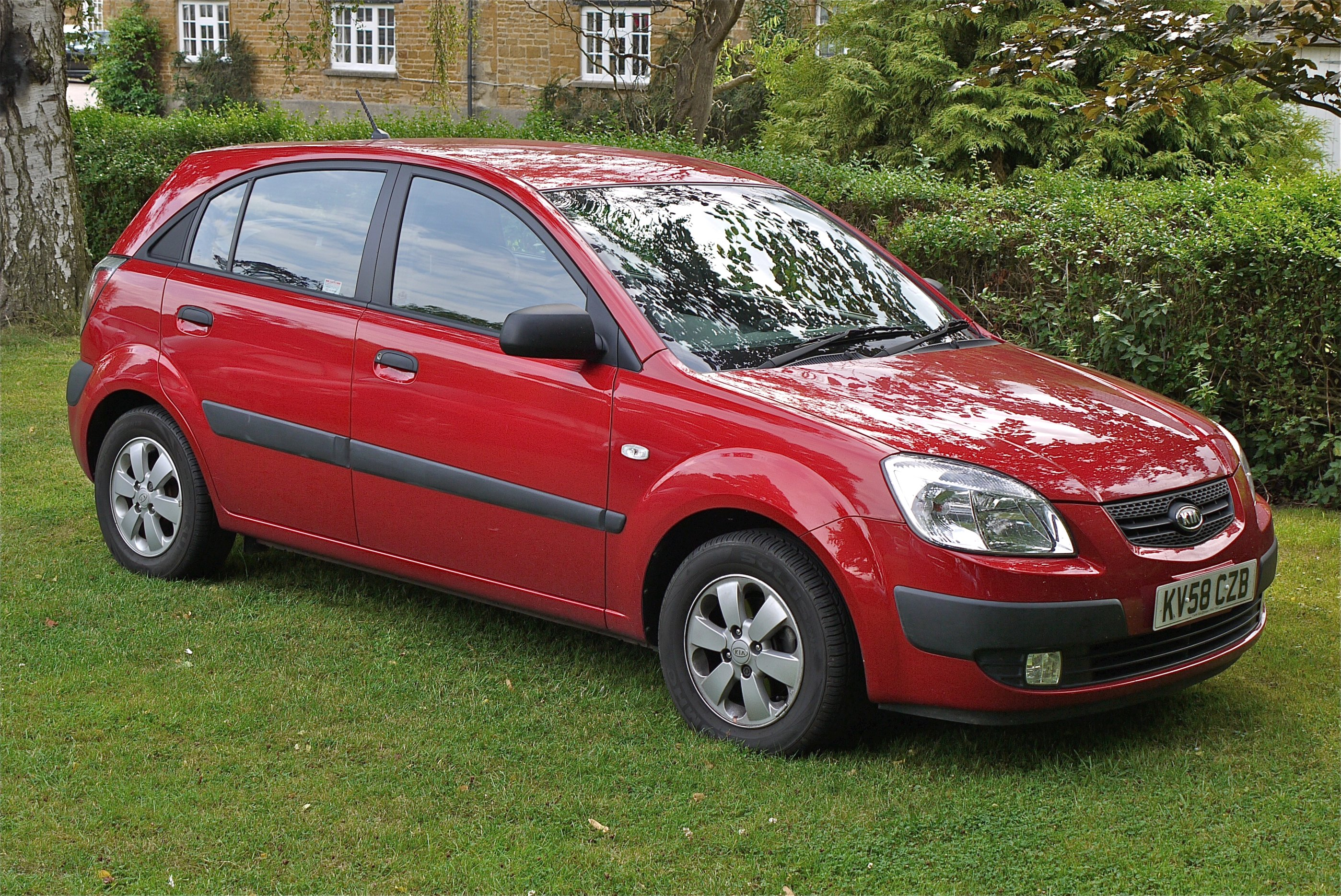 Panasonic G1 14-45 Lens